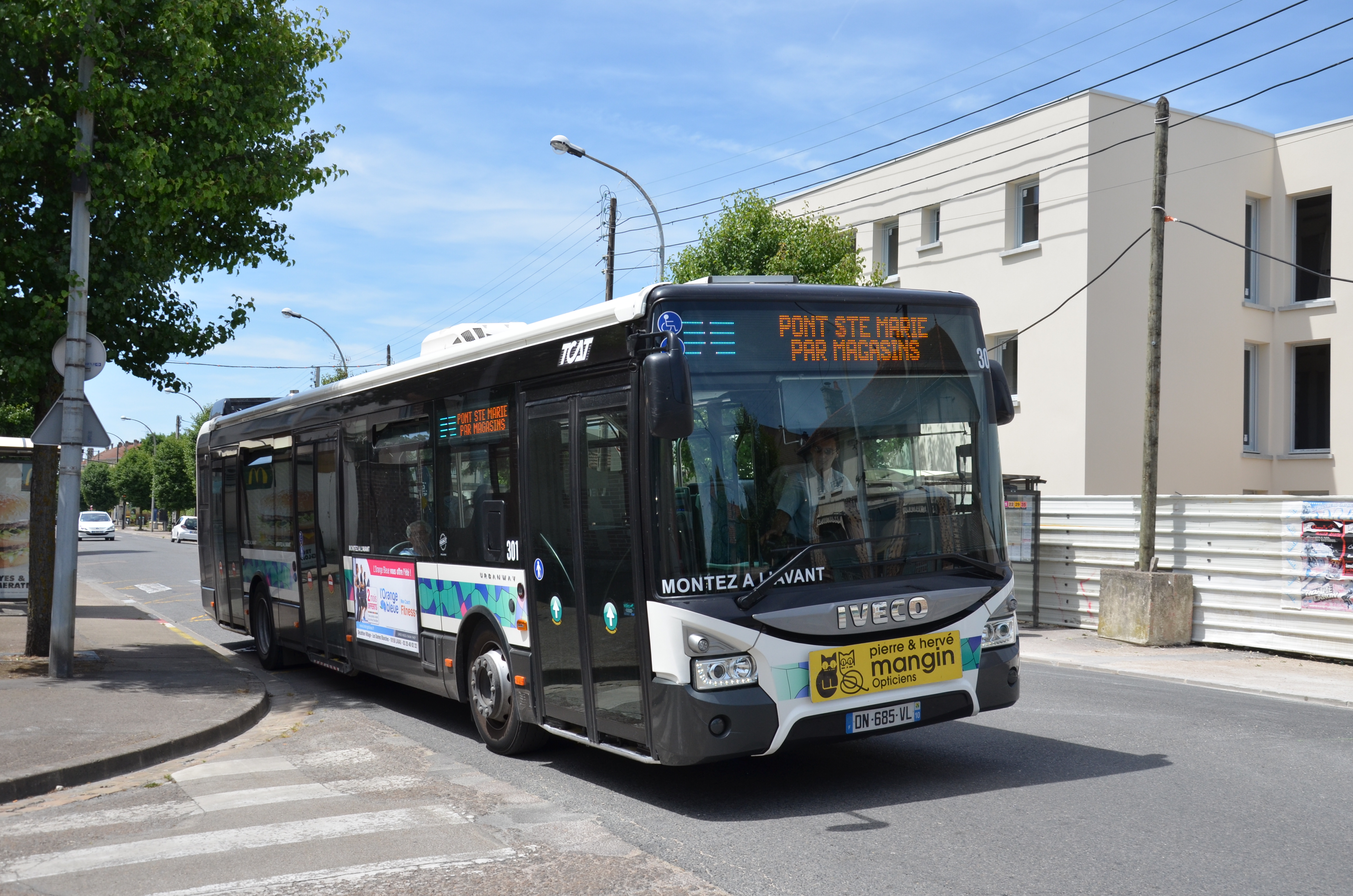 Iveco Urbanway 12 n°301 sur la ligne 1 du réseau TCAT de Troyes, quittant l'arrêt Cuvier.